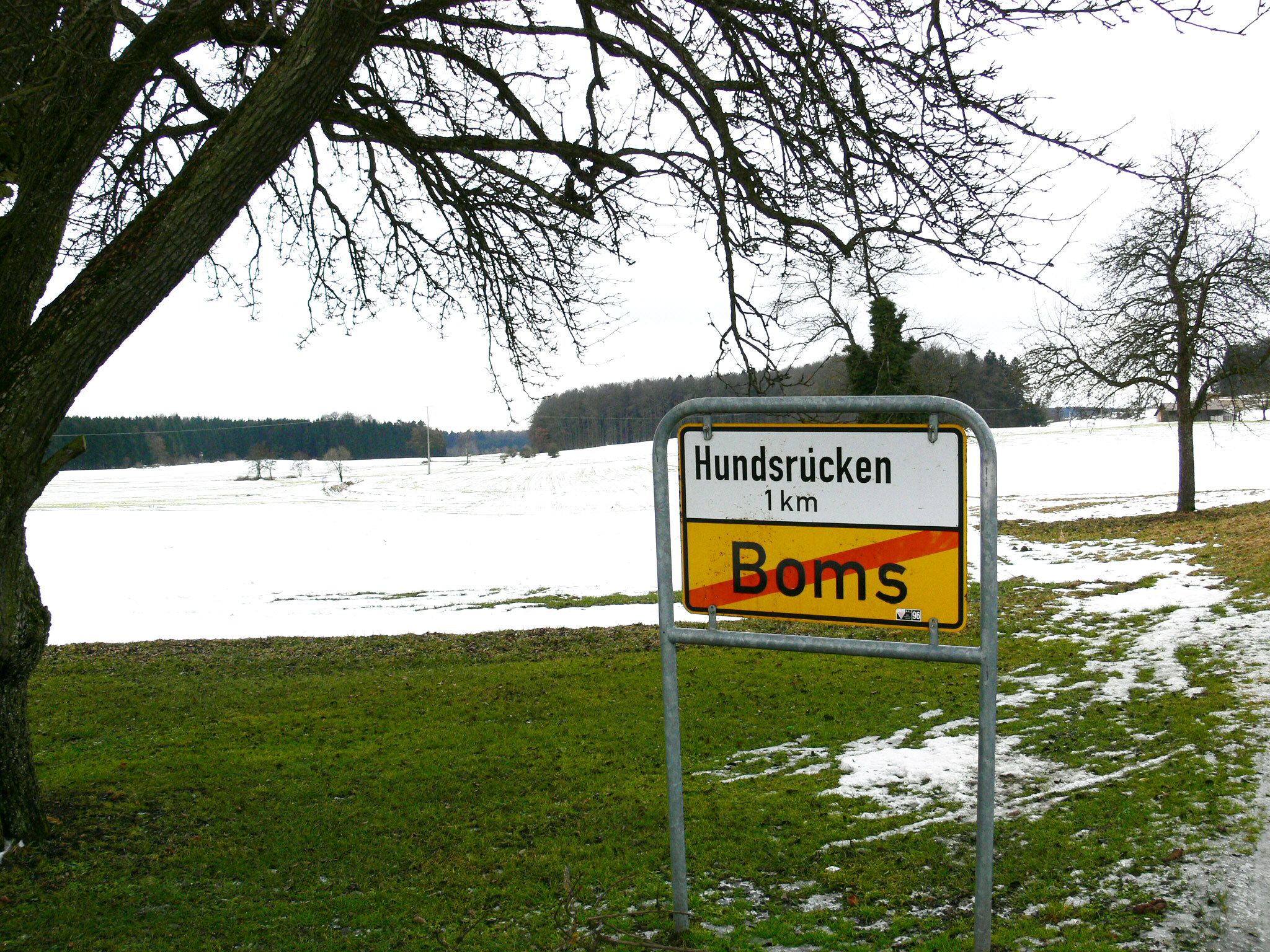 Boms, Ortsschild am Ortsausgang Richtung Ortsteil Hundsrücken